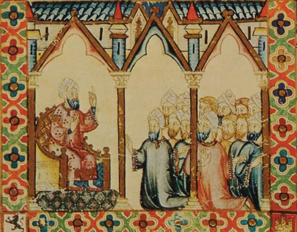 Cantiga 169. Ibne Hude recebendo peticionários. Cantigas de Santa Maria.